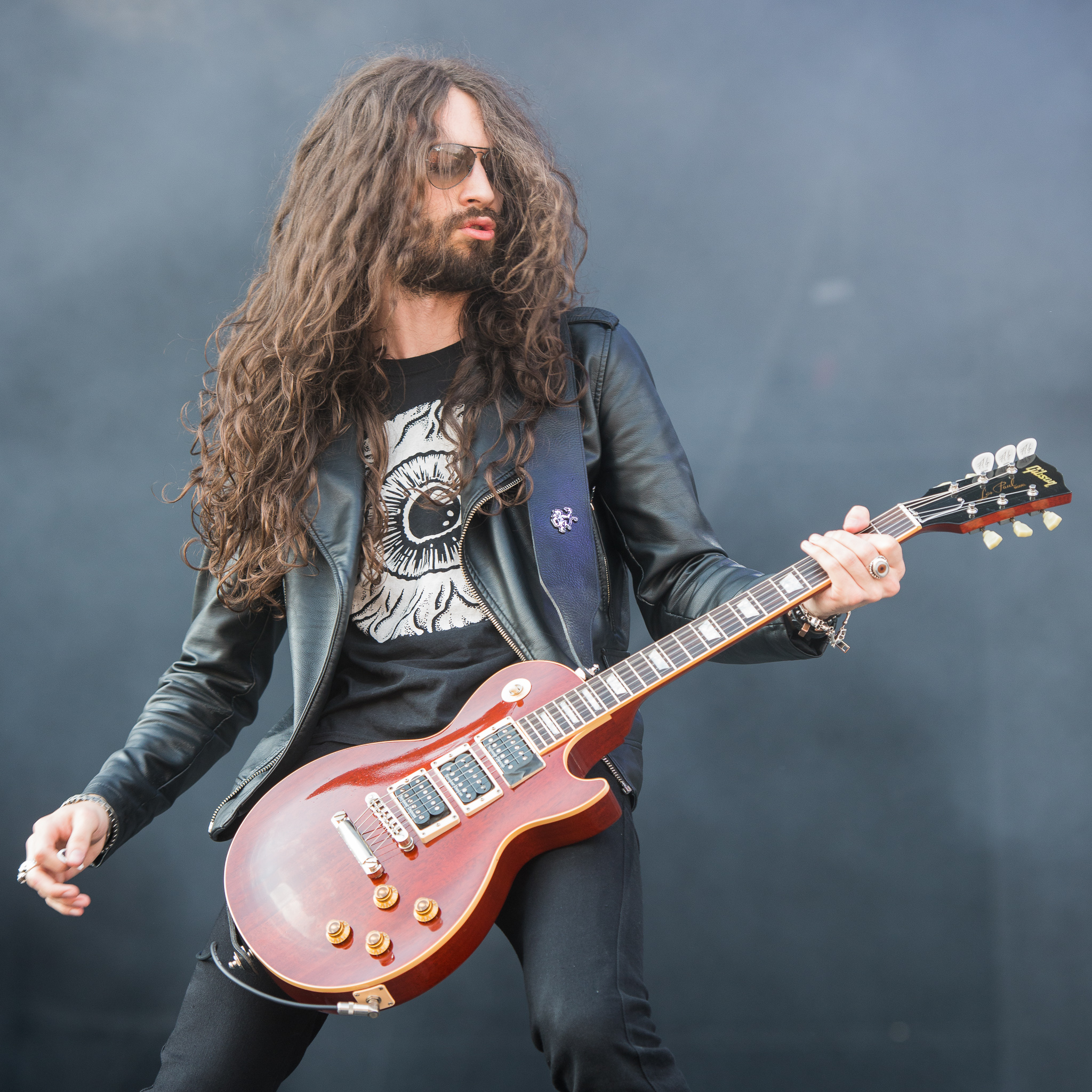 ARGO-Konzerte,Festival,Frank Sidoris,Konzert,Livekonzert,Livemusik,Musik,RiP,Rock im Park 2015,Seat Zeppelin Stage,Slash feat. Myles Kennedy & The Conspirators